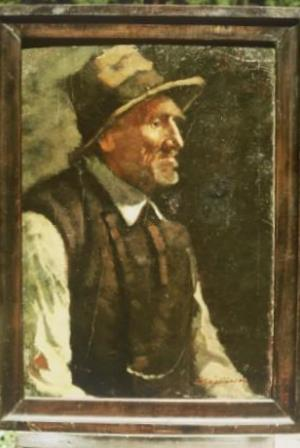 Tokácsli Lajos Öreg halász c. képe, a szentesi múzeum tulajdona